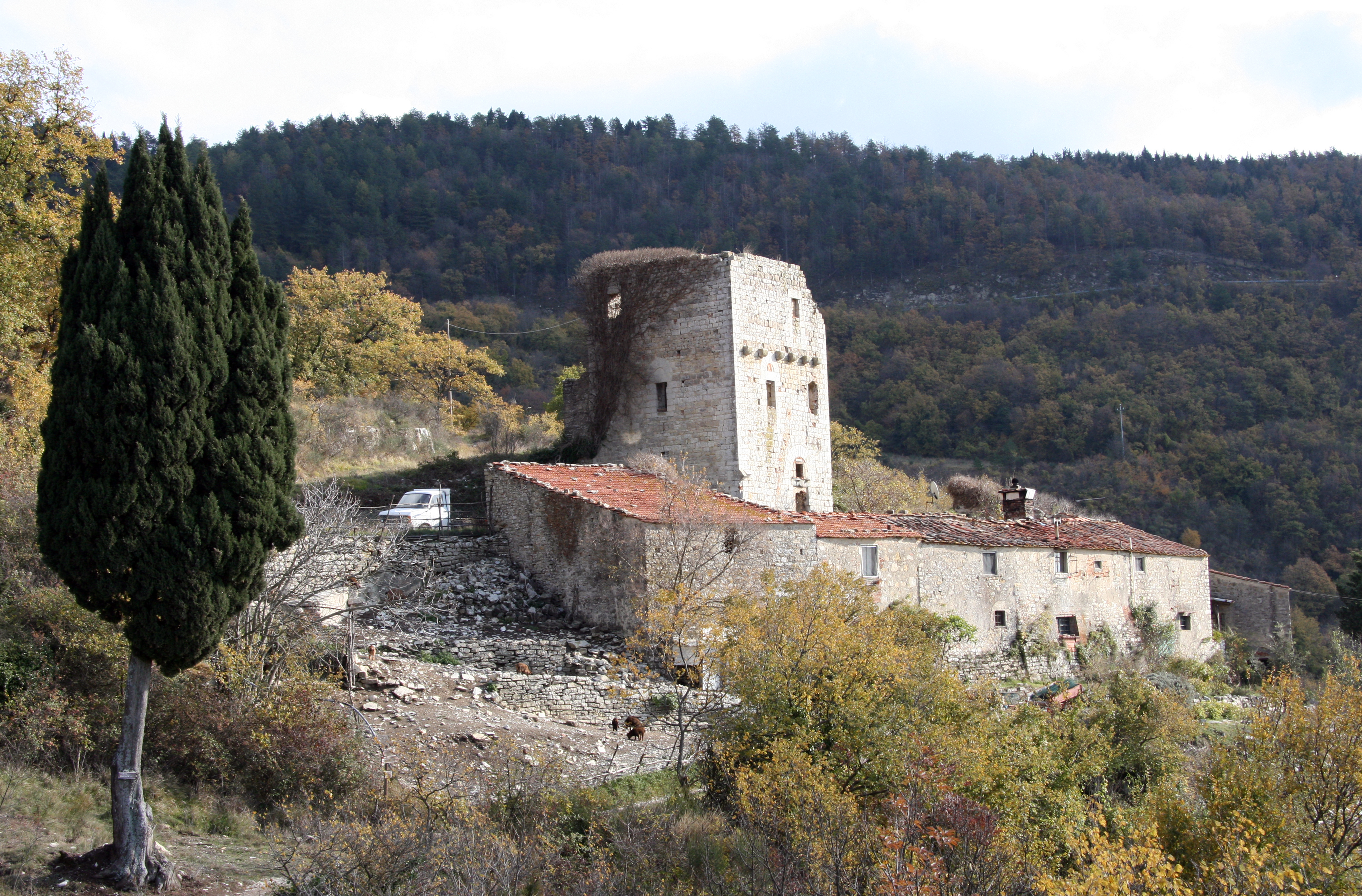 La torre di Baracca e gli edifici circostanti - Sesto Fiorentino